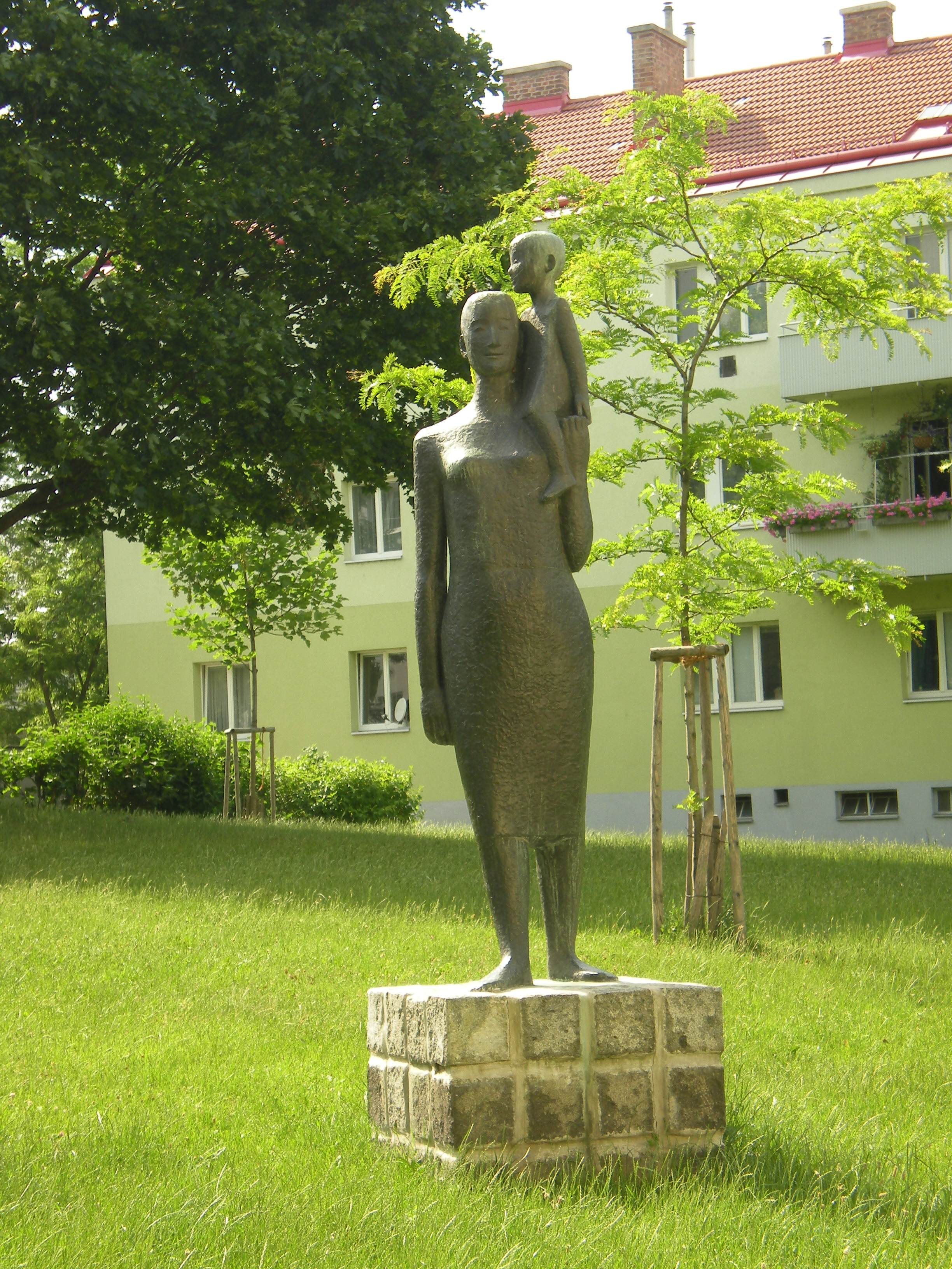 Bronzeplastik in der Wagramerstrasse in Wien This media shows the Vienna residential building (Gemeindebau) with the ID 1556.